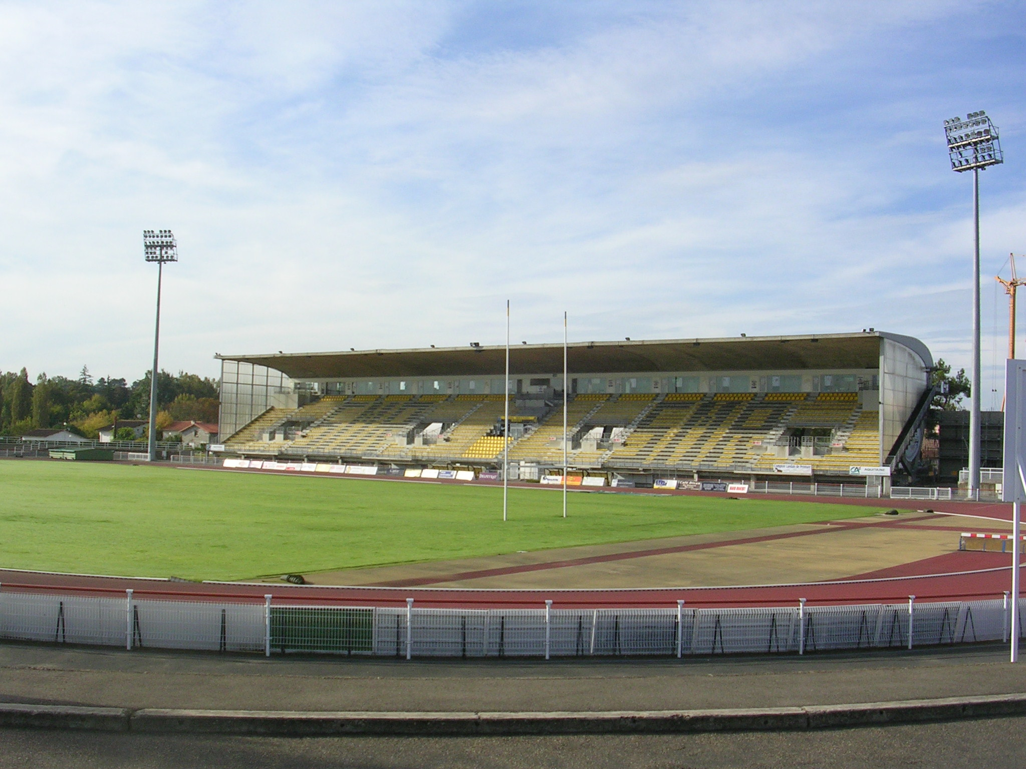 Stade Guy Boniface à Mont-de-Marsan (Landes, France)